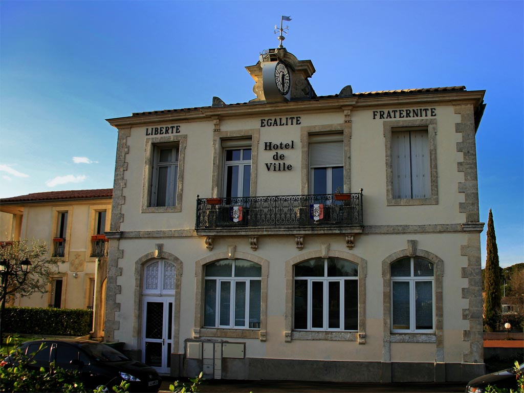 Hôtel de ville Jacou